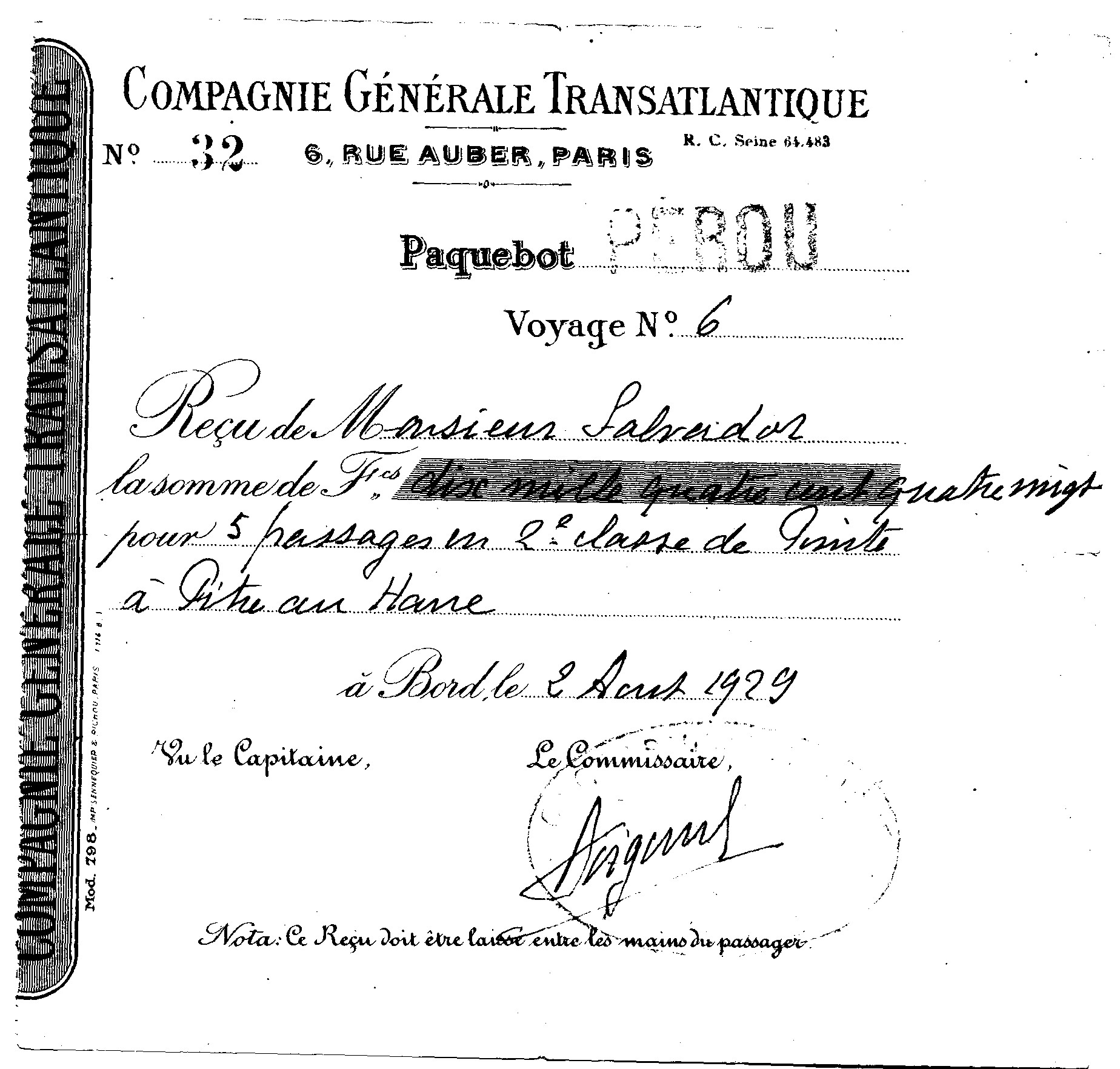 Description récépissé de payement du voyage de la famille SALVADOR Date1929SourceOwn work by the original uploaderAuthorZandoli récépissé de payement du voyage de la famille SALVADOR